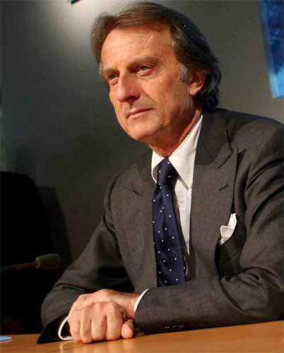 Luca Cordero di Montezemolo